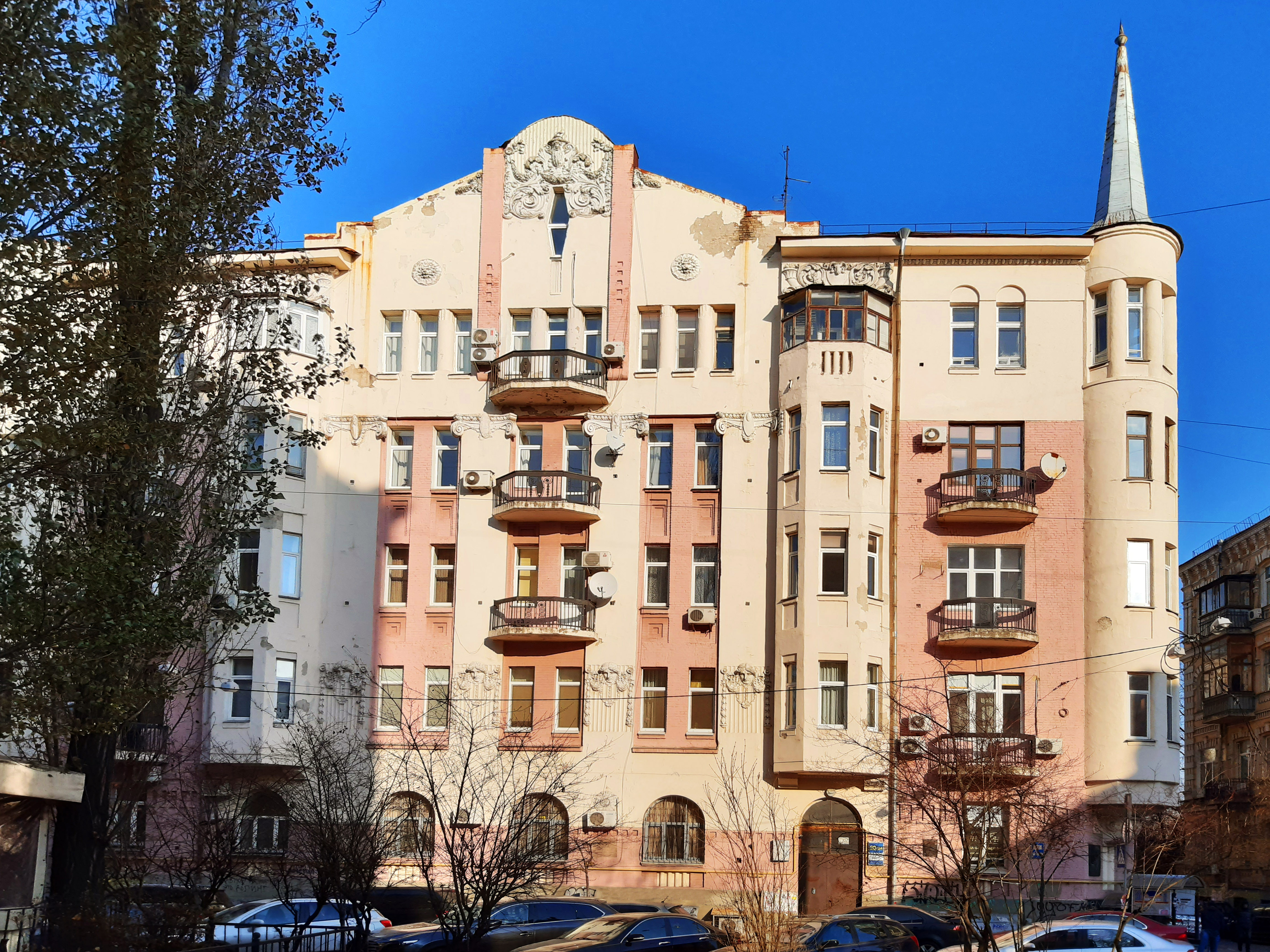 Прибутковий будинок, Київ, вулиця Рейтарська, 20/24